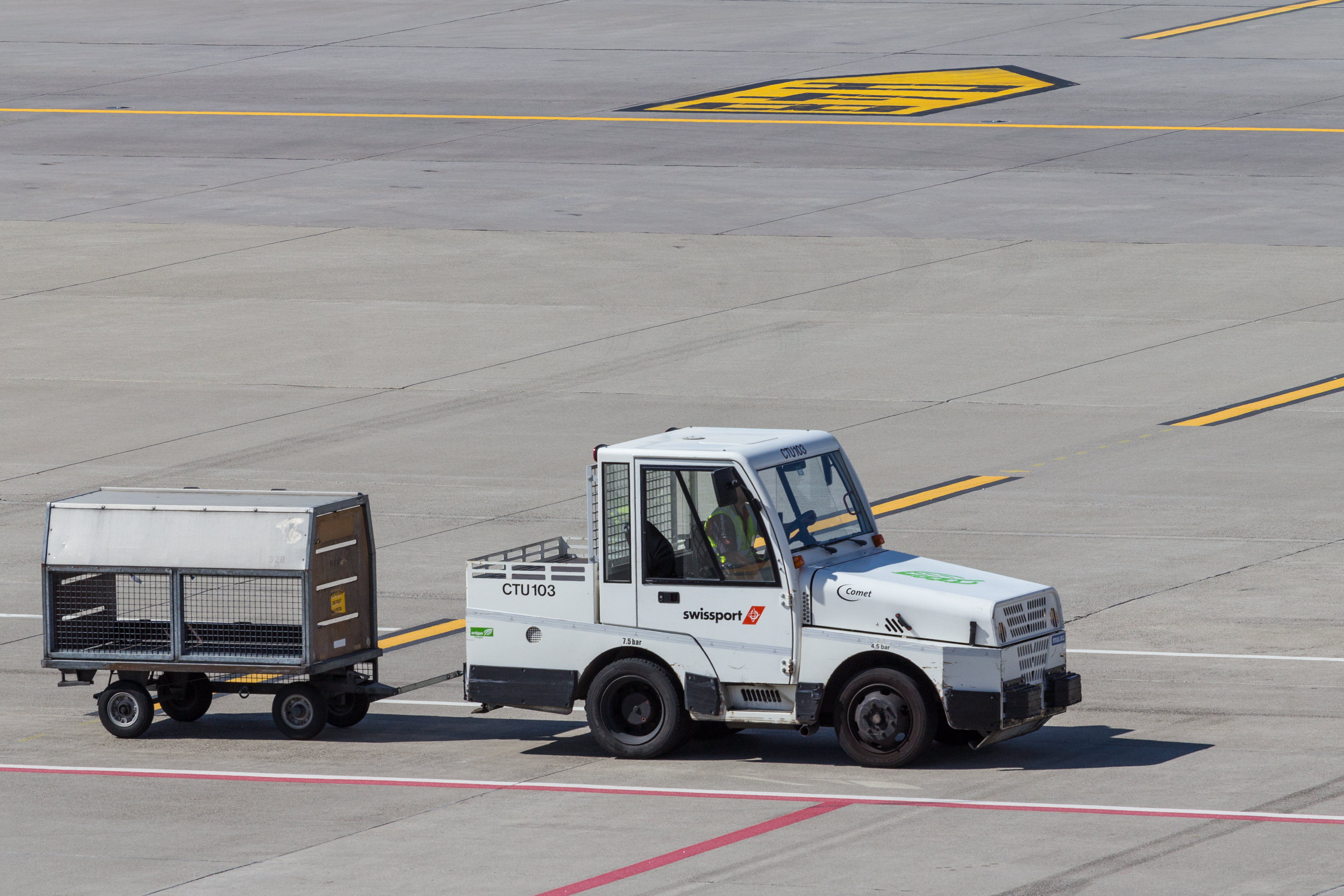 MULAG Comet Flughafenschlepper in Zürich